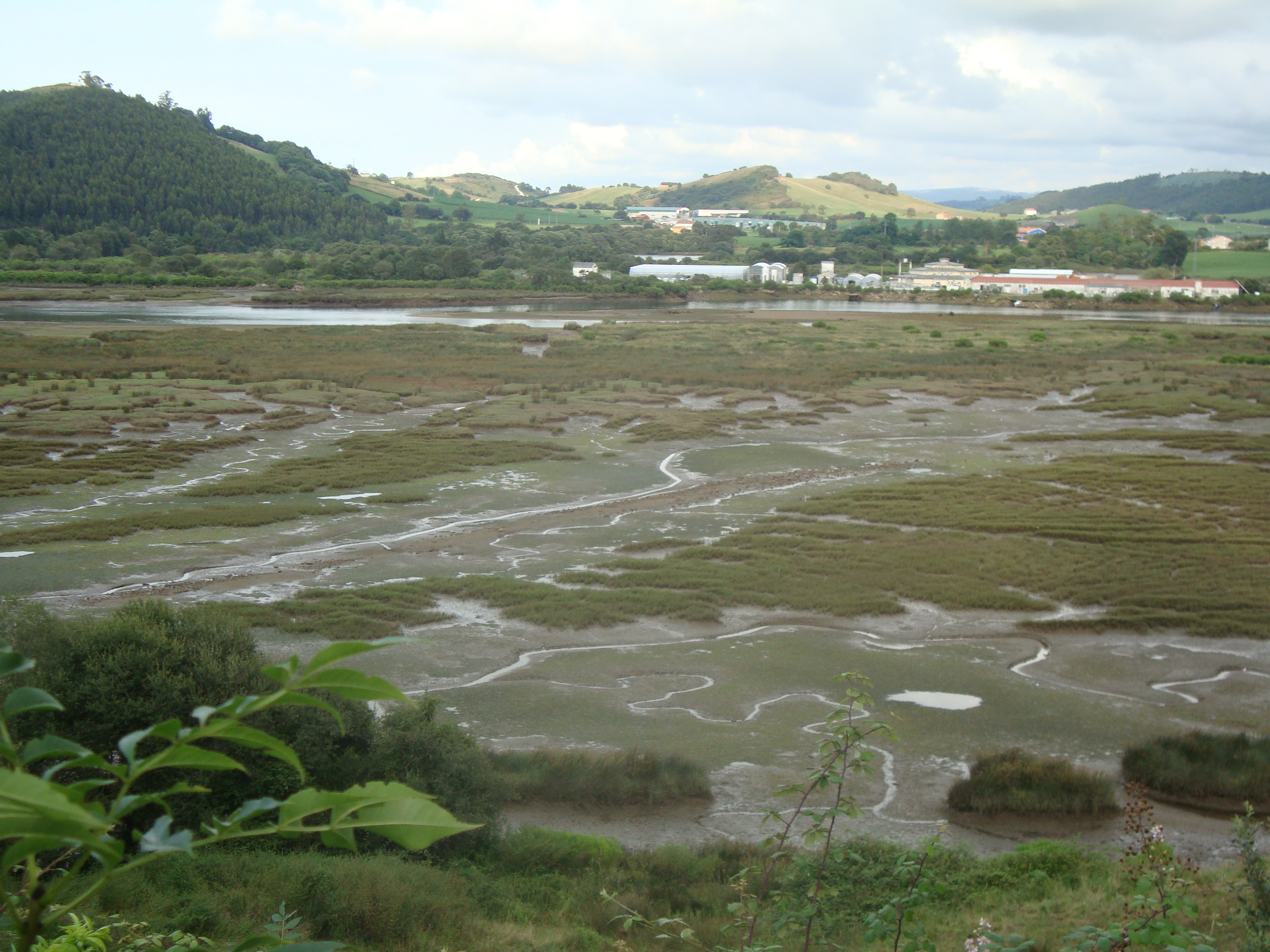 Marismas en la ría de Tina Menor (desembocadura del río Nansa), en el municipio de Val de San Vicente (Cantabria, España